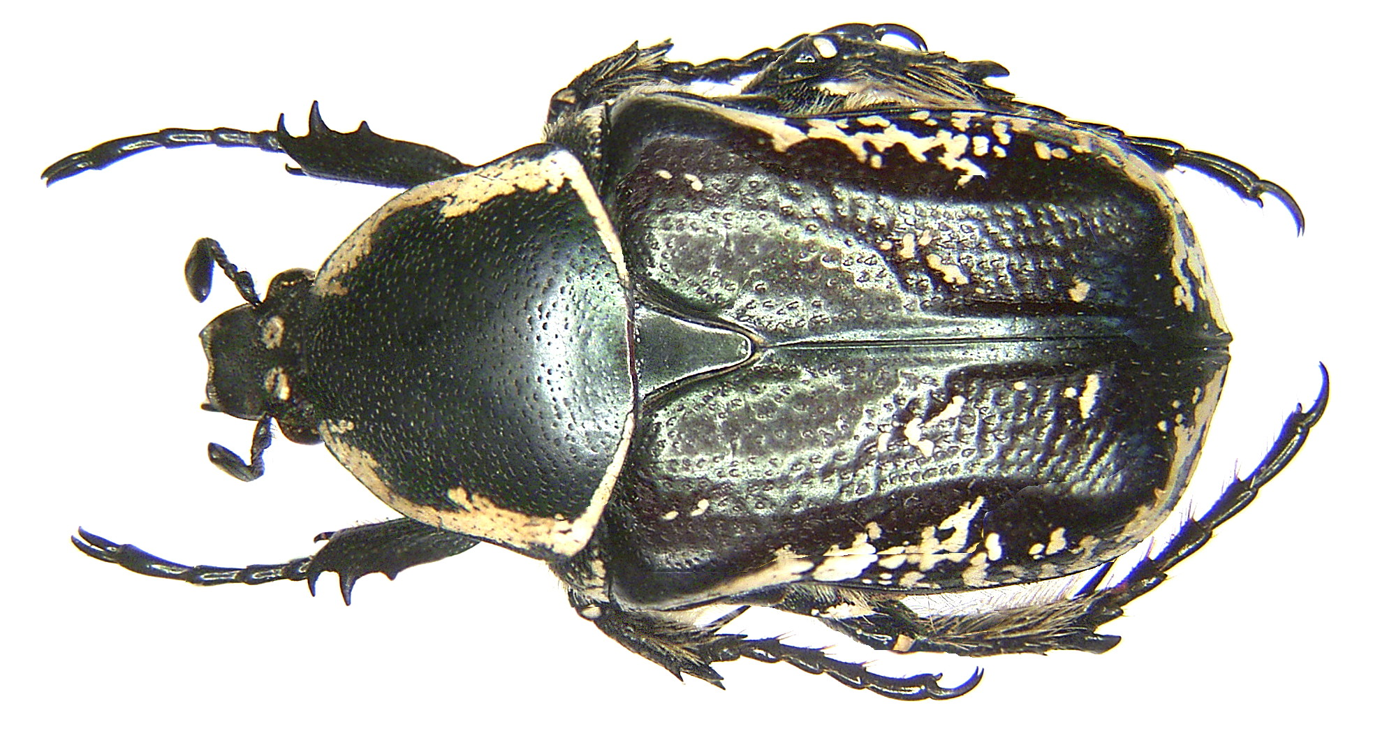 Familie: Scarabaeidae Grösse: 13-21 mm Verbreitung: Marokko, Algerien, Tunesien, Andalusien, Kalabrien, Sizilien Fundort: Tunesien, Hammamet leg.det. U.Schmidt, 1993 Foto: U.Schmidt, 2006